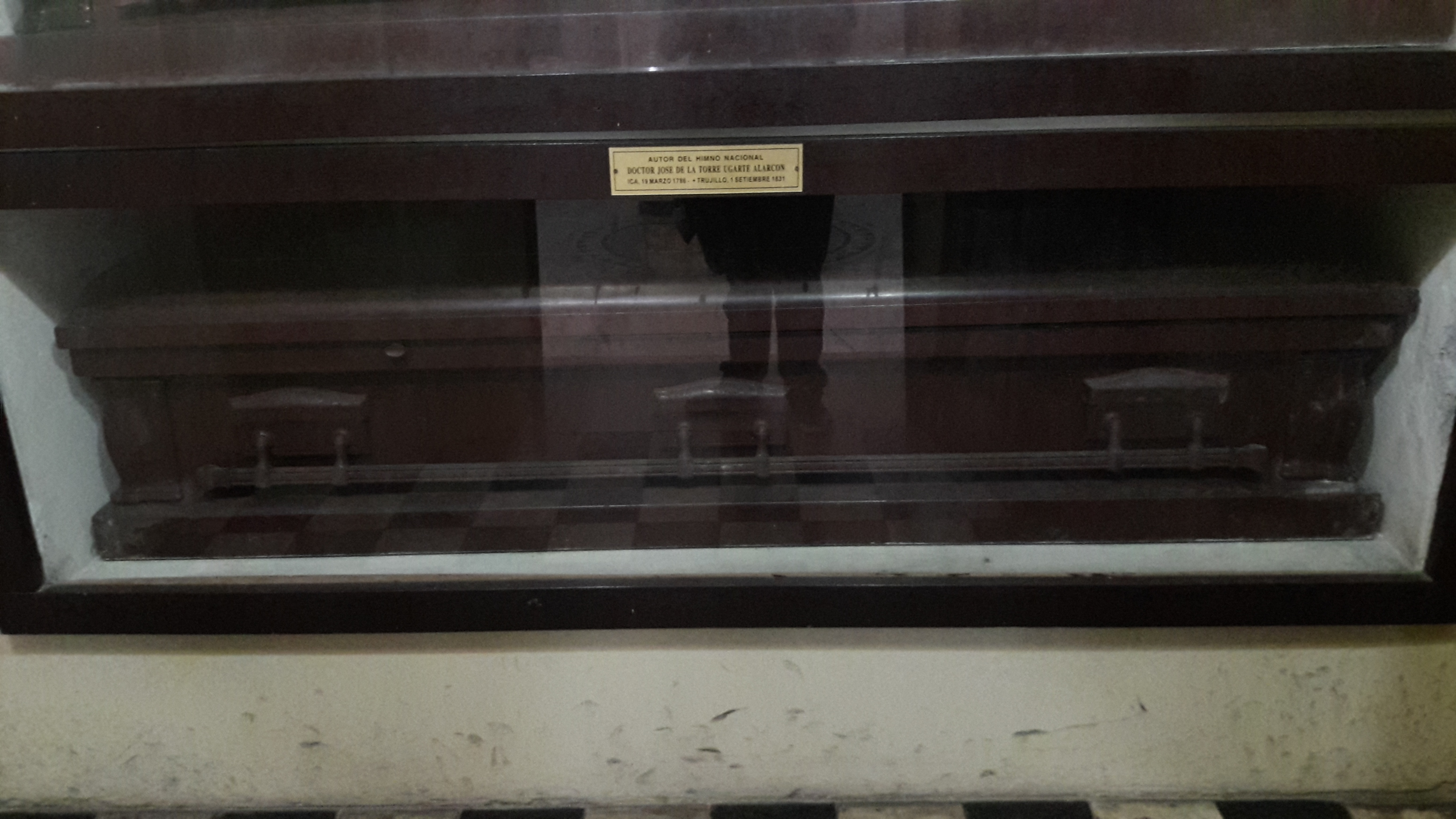 Tumba de José de la Torre Ugarte